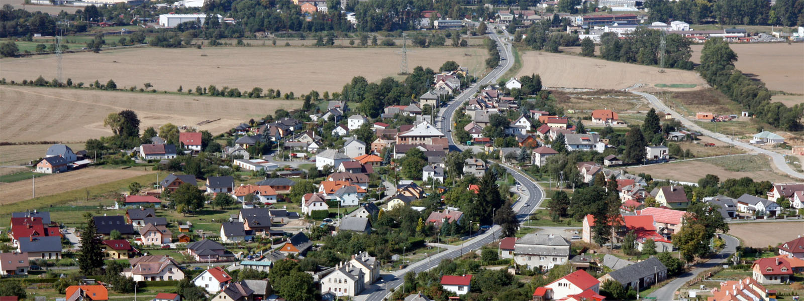 letecký pohled na Plechy